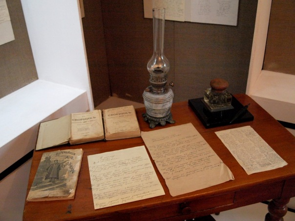 Беларуская (тарашкевіца): Мясьціны жыцьця і творчасьці Я. Купалы: дом Я. Купалы, дом шафёра, лазьня, гаспадарчыя пабудовы, помнік Я. Купалу. в. Ляўкі This is a photo of Belarusian heritage monument. Reference number: 213Б000134 ( WLM)